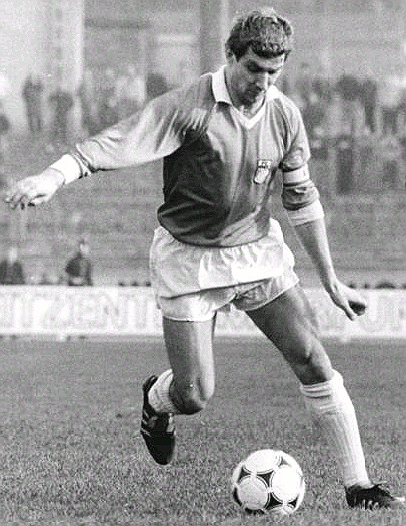 Title: FC Rot-Weiß Erfurt - BSG Stahl Brandenburg 2:2 Factual corrections and alternative descriptions are encouraged separately from the original description. Additionally errors can be reported at this page to inform the Bundesarchiv. Original historic description: ADN-ZB-Hirndorf -6.4.88-A-Erfurt: Fußball-Oberliga- Fc Rot-Weiß Erfurt - BSG Stahl Brandenburg- 2:2- Mit seinen Treffern in der 36. und 74. Minute erzielte der Erfurter Kapitän Jürgen Heun sein 99. und 100. Oberligator. In der Liste der besten Torschützen der Saison 1987-88 liegt er mit 13 Toren an zweiter Stelle.